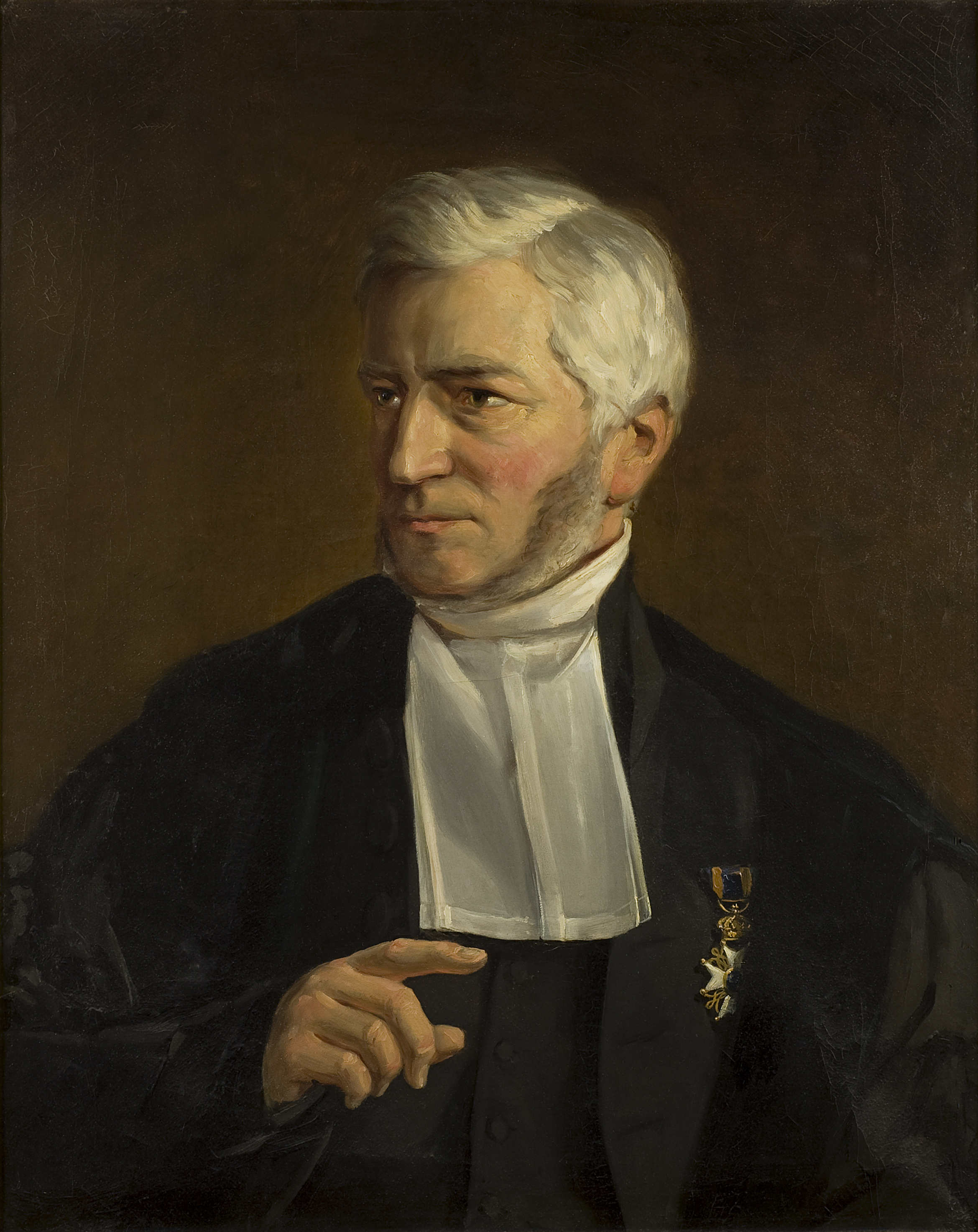 Portret van Claas Mulder.